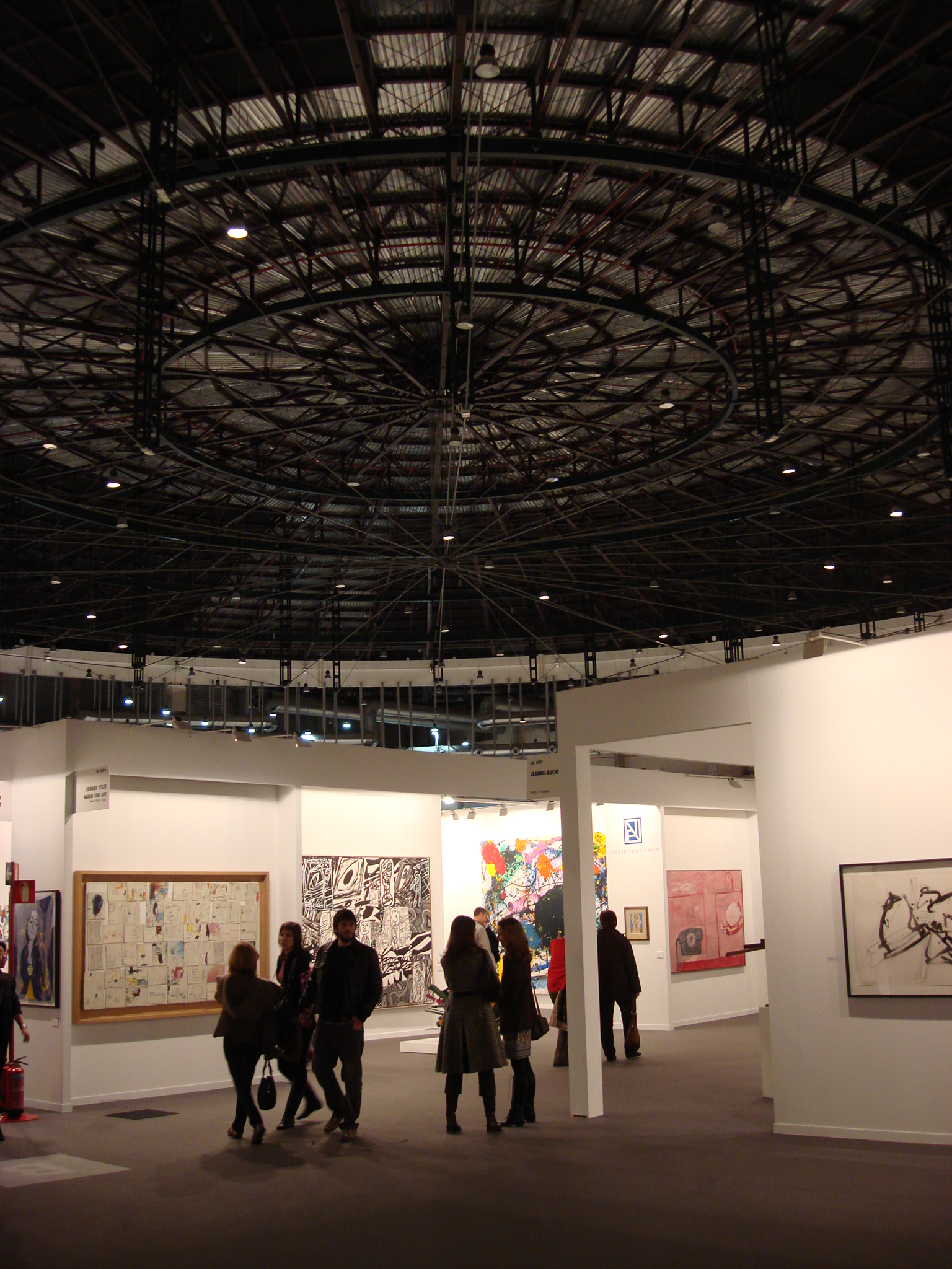 (ARCO8 - Madrid)